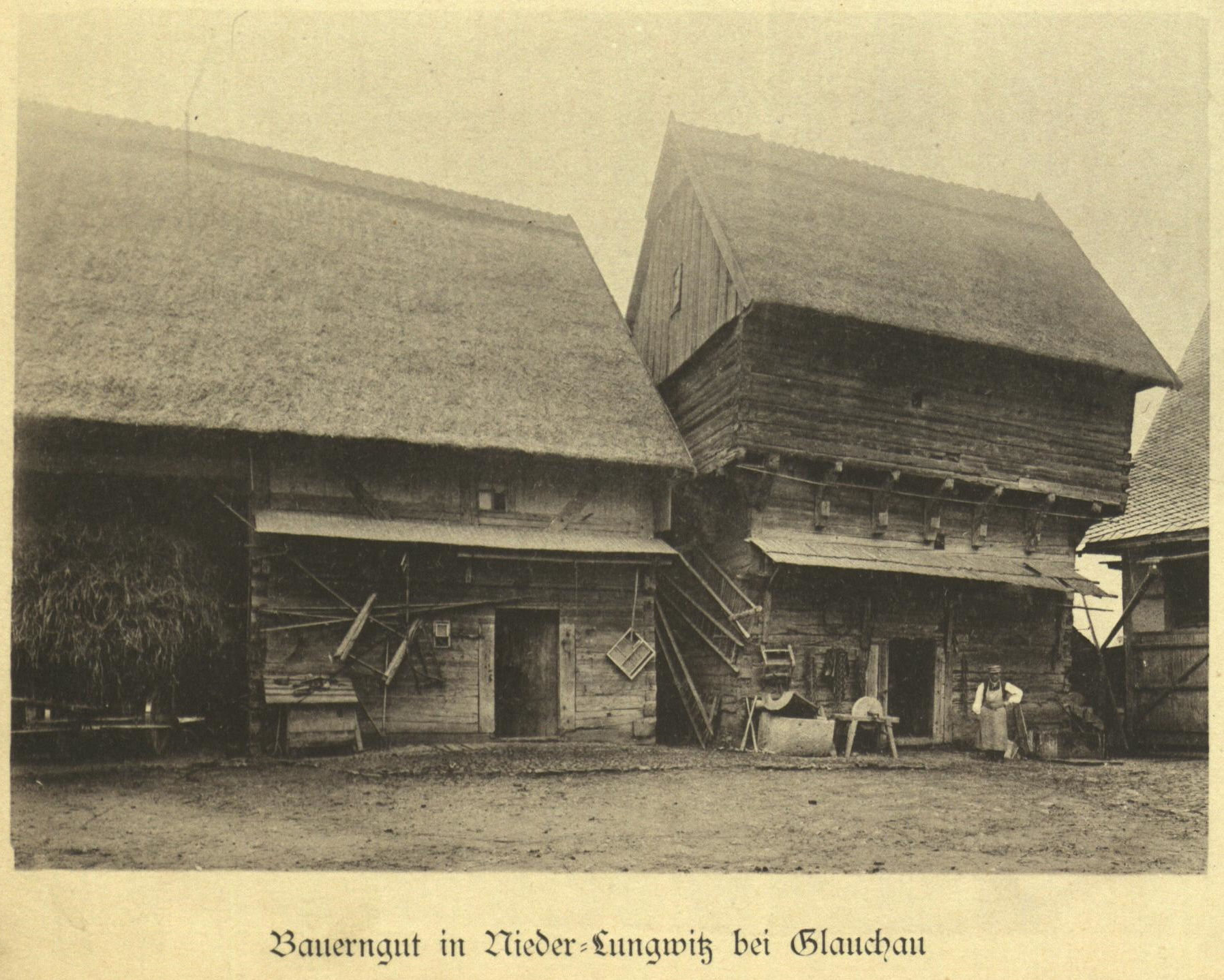 Abbildung aus: Sächsische Volkstrachten und Bauernhäuser